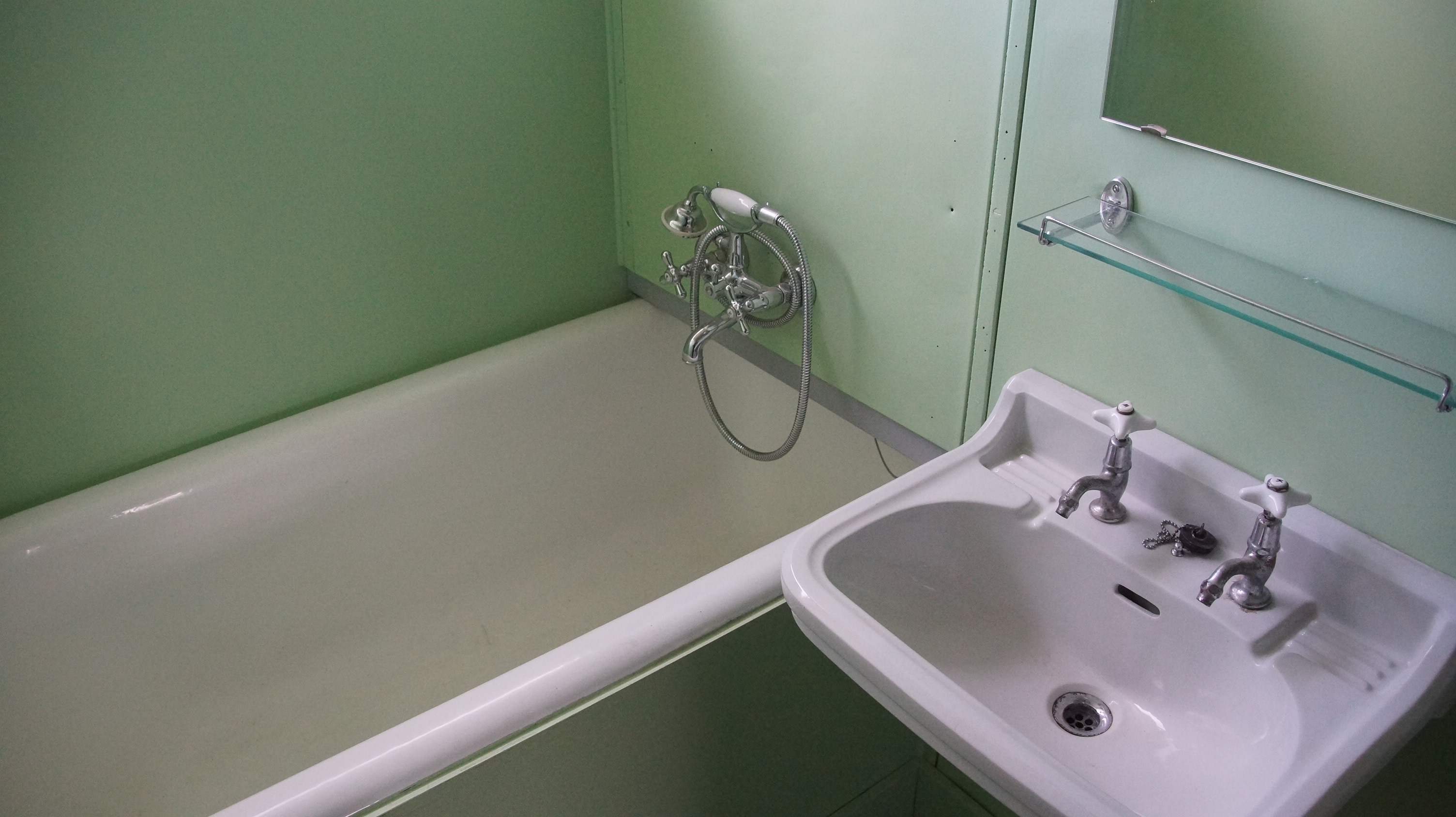 MAN-Stahlhaus im Fränkischen Freilandmuseum Bad Windsheim